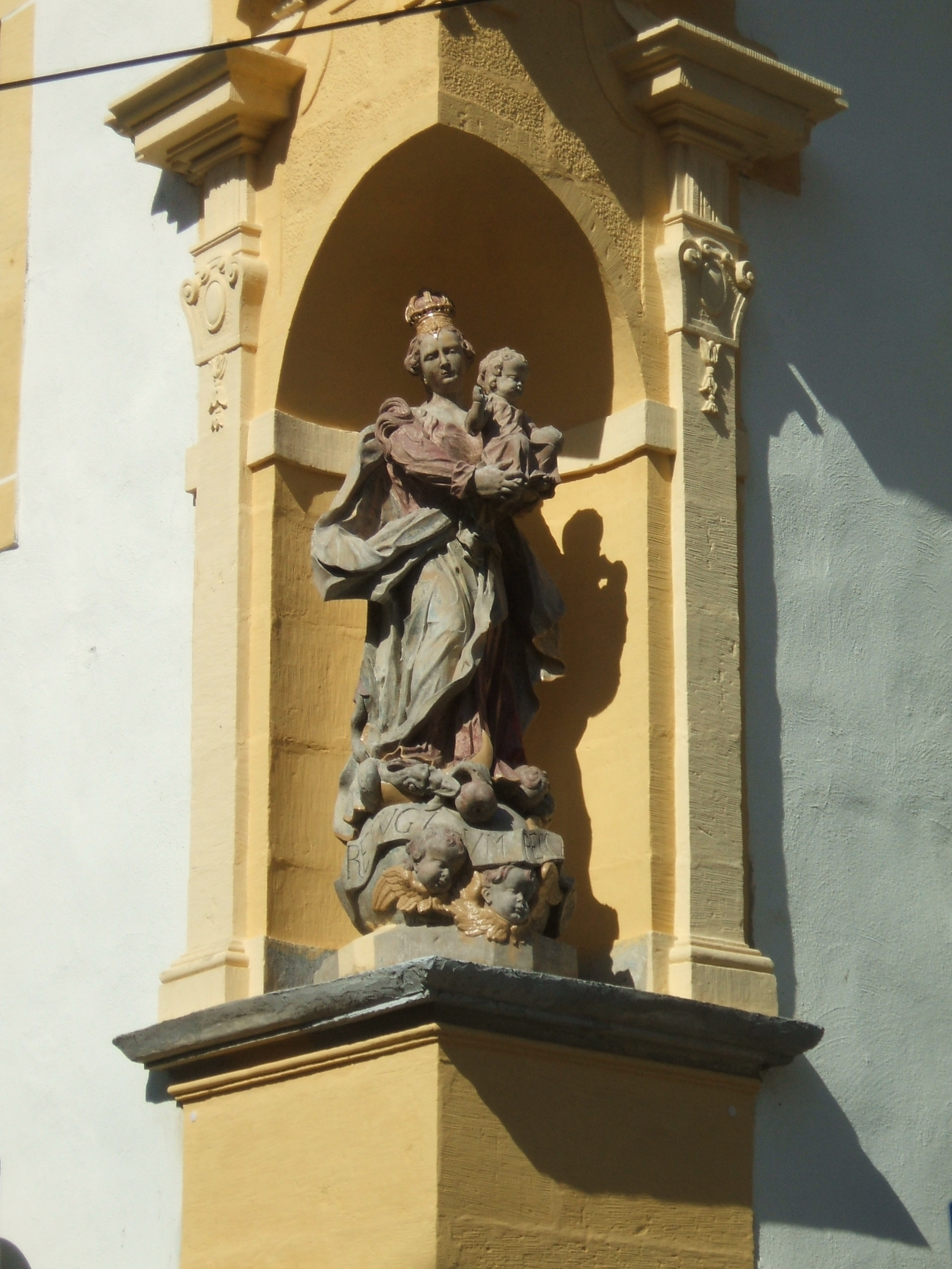 Marienfigur bei der Martinikirche in Erfurt (Deutschland).